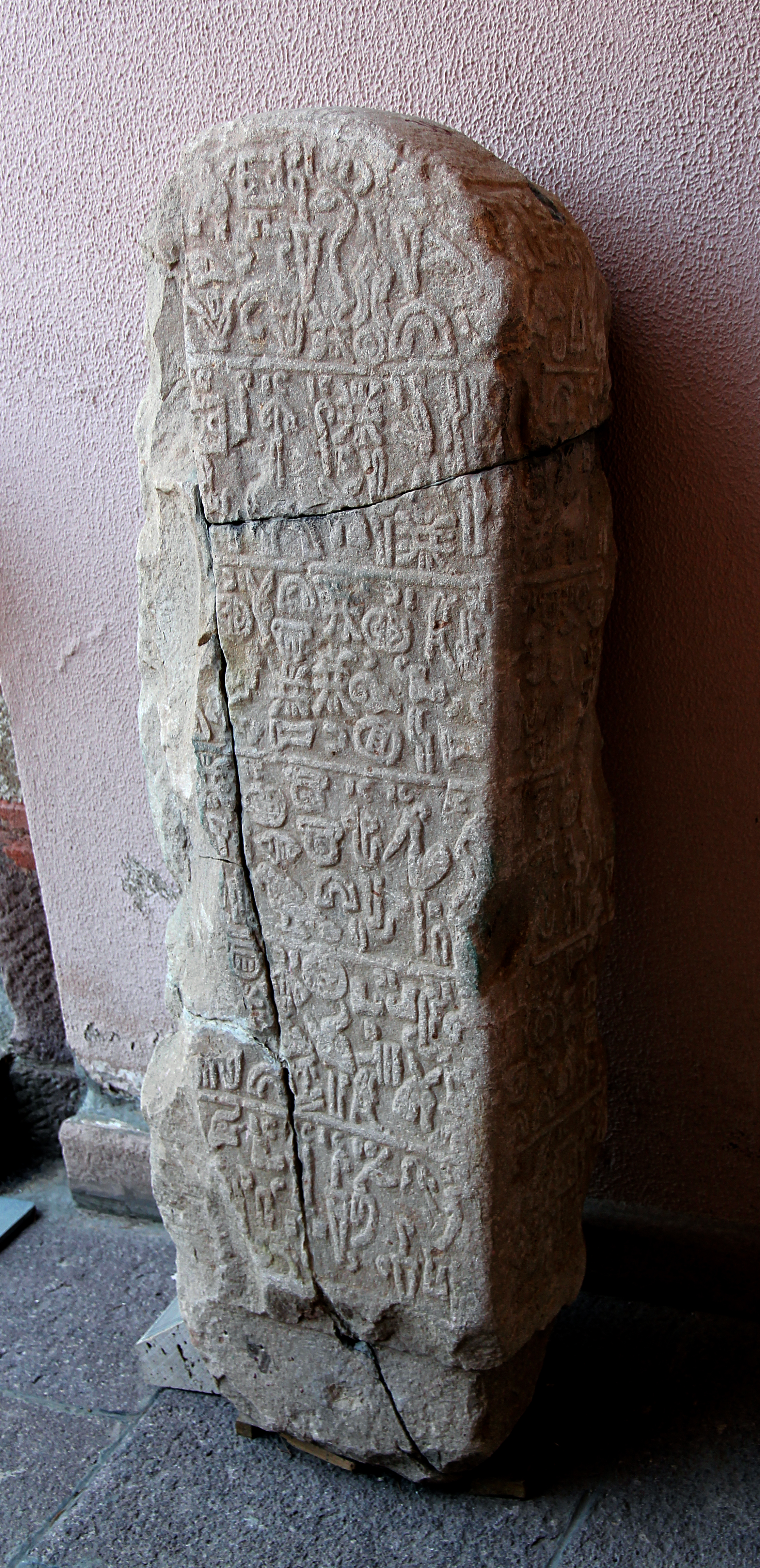 Museum für anatolische Zivilisationen, Ankara, Türkei, Stele von Kayseri